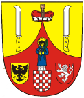 Znak města Hranice (na Moravě)